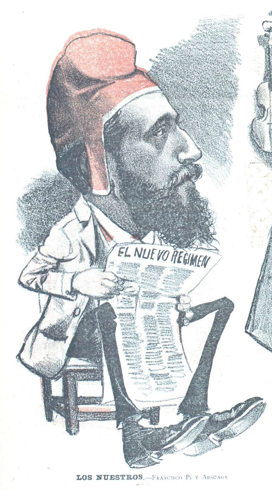 Caricatura.